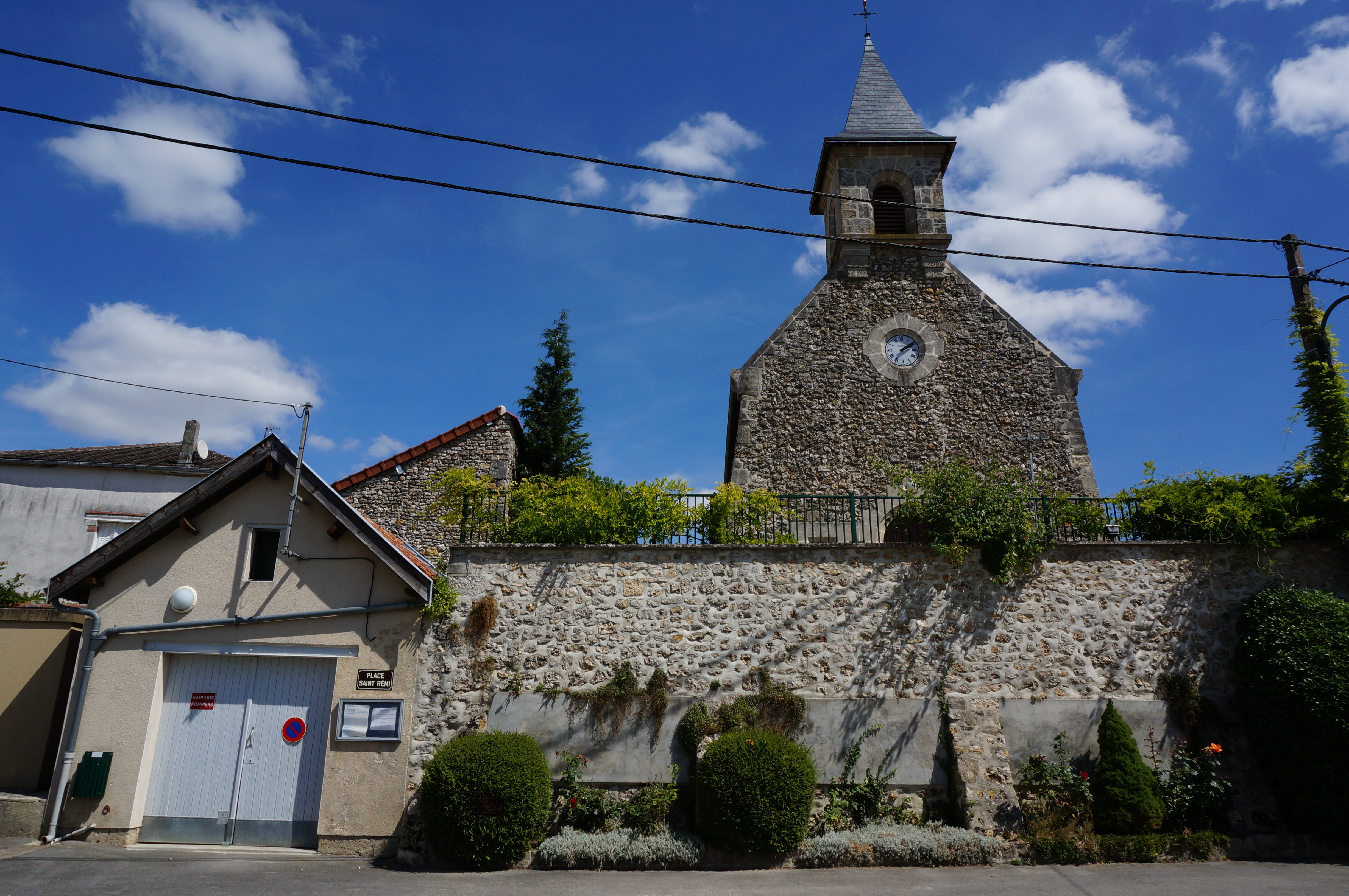 Une vue de l'église et du hangar de pompiers sur le côté .